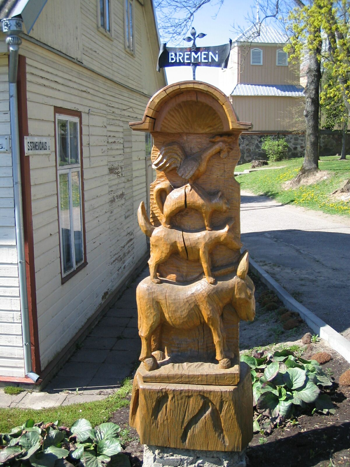 Paminklas Brėmeno muzikantams. Brėmeno muzikantai Viduklėje.